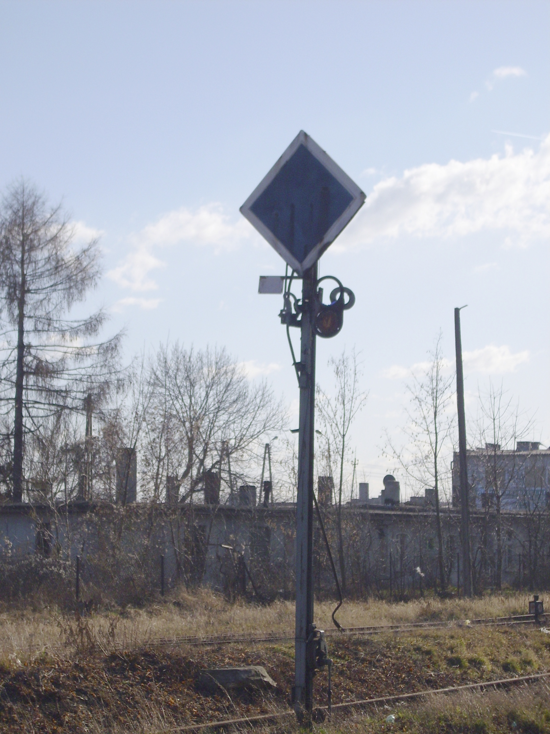 Kobierzyce. Tarcza manewrowa.